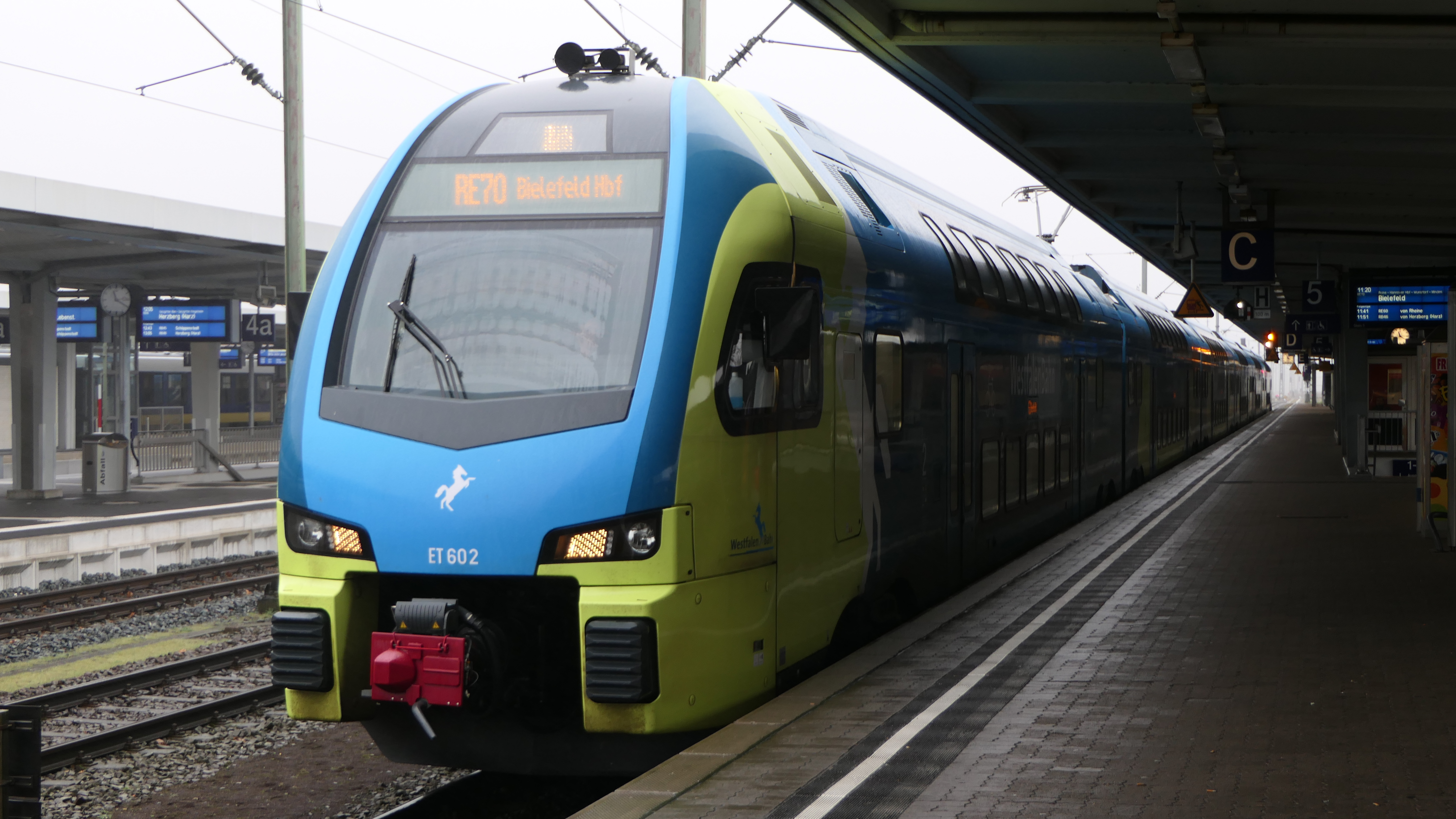 Regionalexpress (RE70) der Westfalenbahn kurz vor der Abfahrt nach Bielefeld Hbf. am Braunschweiger Hbf. Fahrzeugtyp ist ein sechsteiliger Doppelstocktriebwagen "Kiss" der Firma Stadler, mit der Nummer ET602.